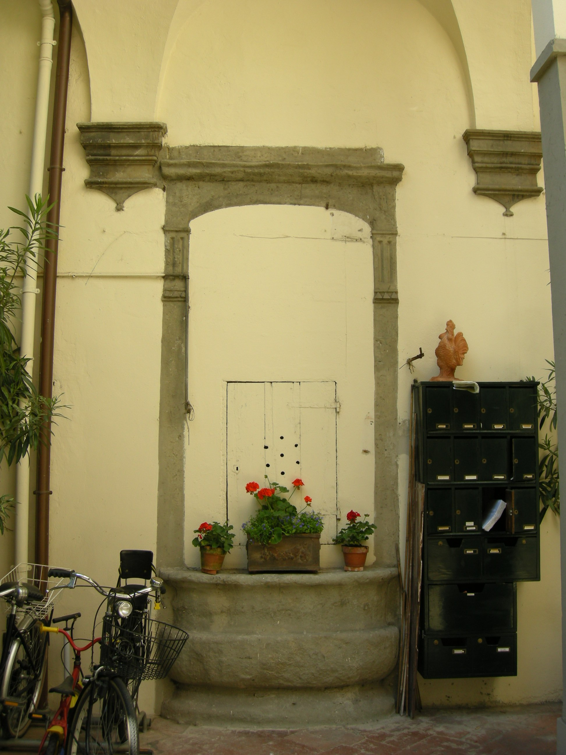 Palazzo mellini fossi, cortile